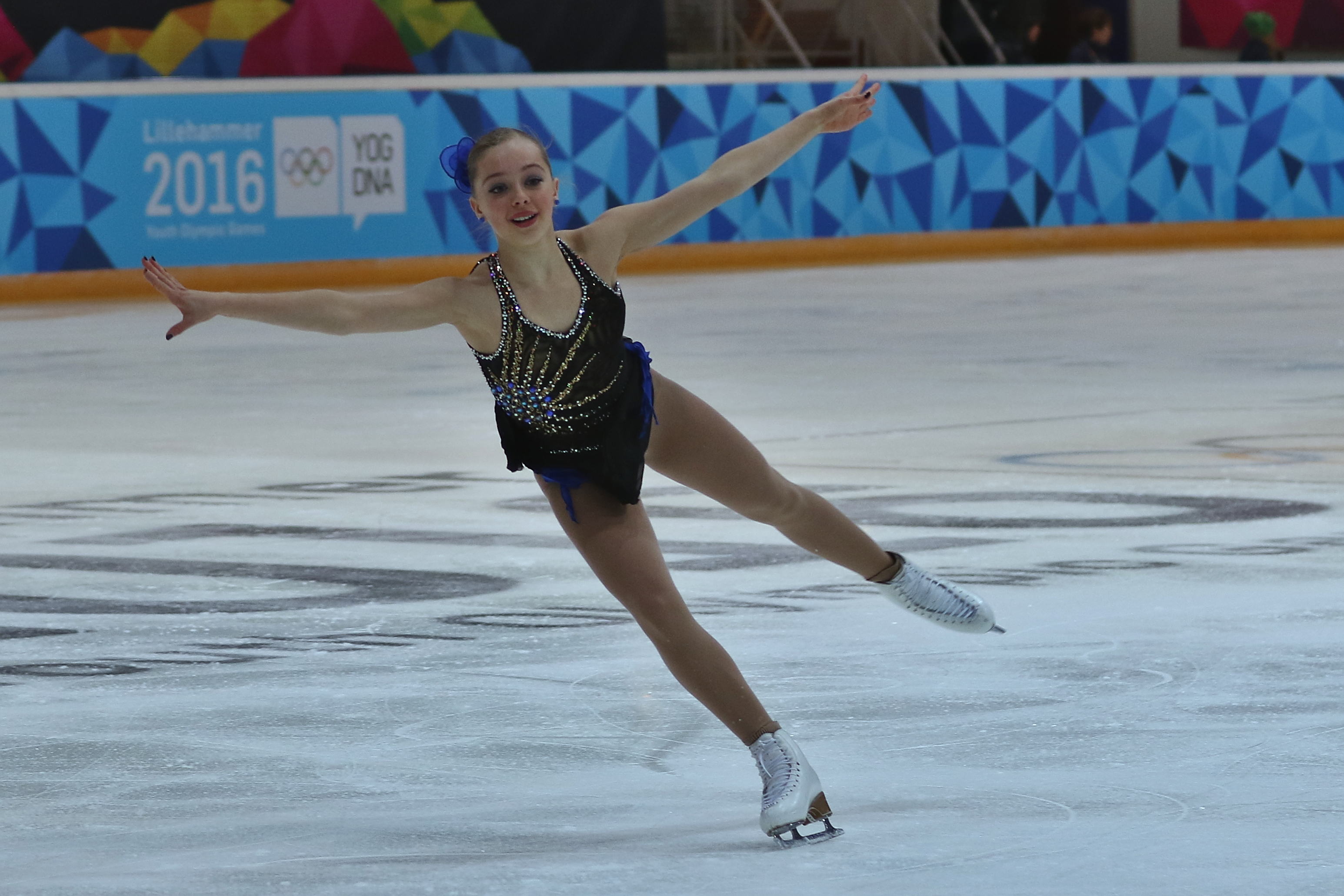 Lillehammer 2016 - Figure Skating Pairs Short Program - Justine Brasseur and Mathieu Ostiguy